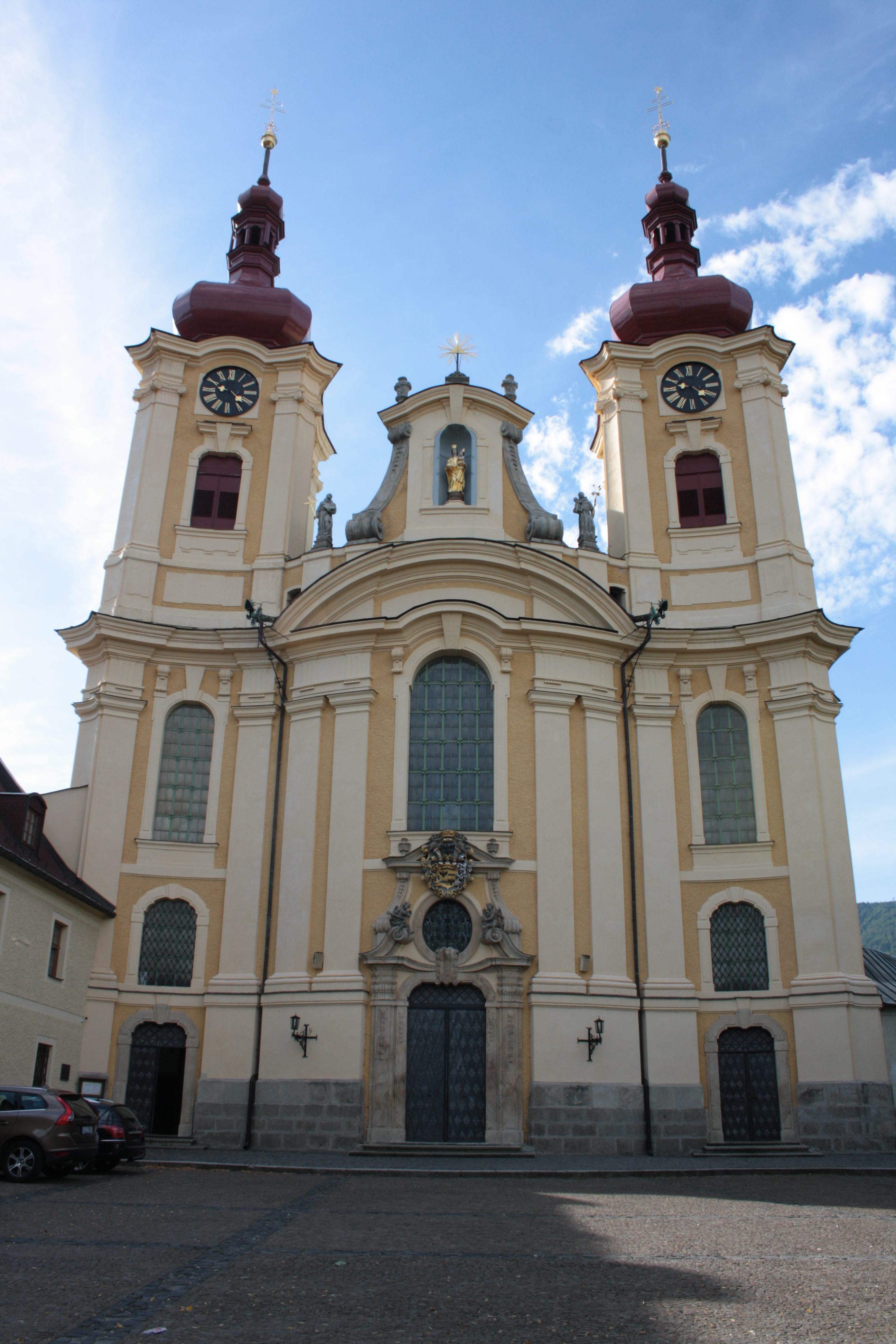 This photograph was taken with a DSLR from WMCZ's Camera grant. Bazilika Navštívení Panny Marie v Hejnicích (pohled ze severozápadu).